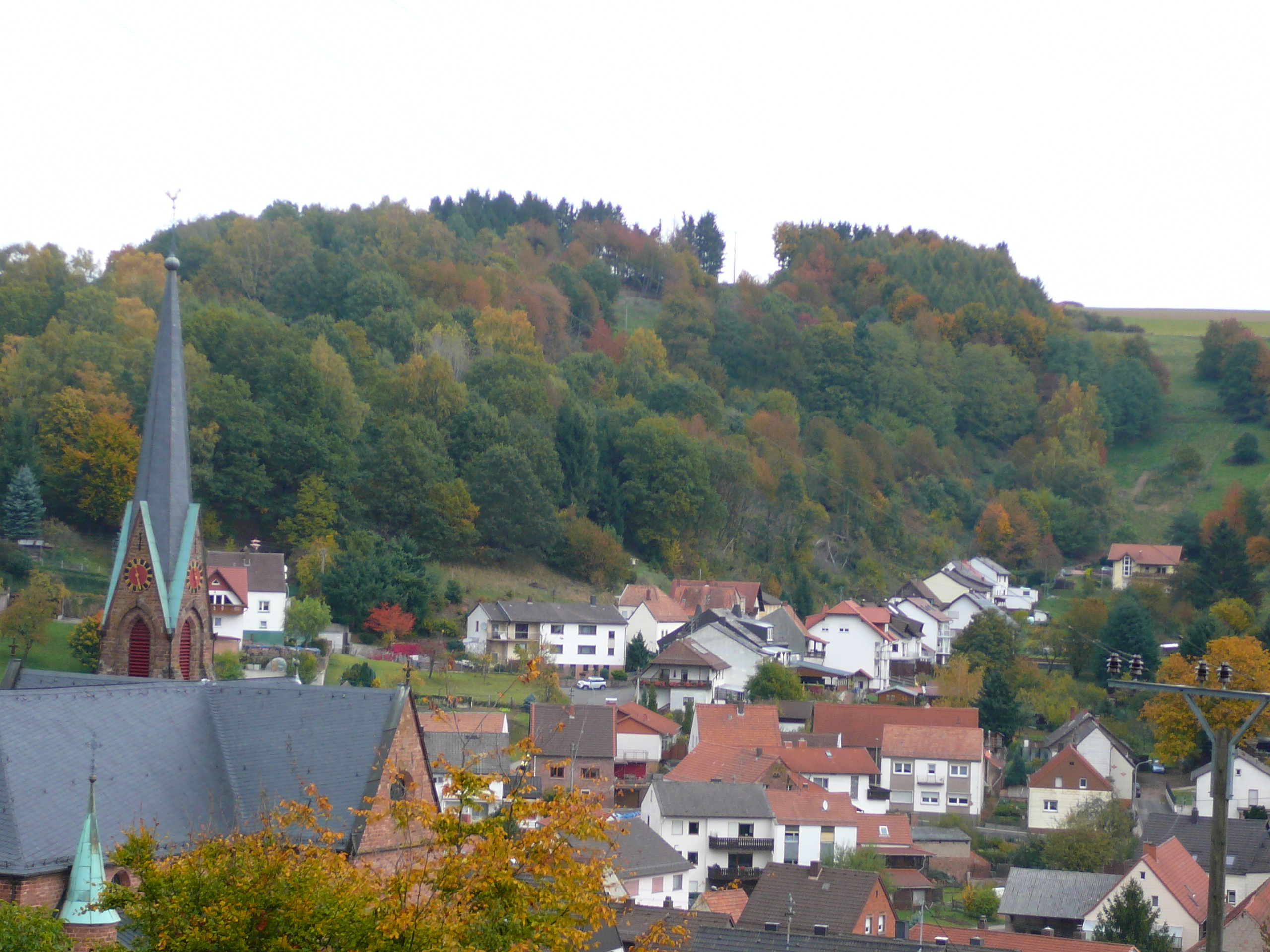 Blick über Bann zum Großen Hausberg